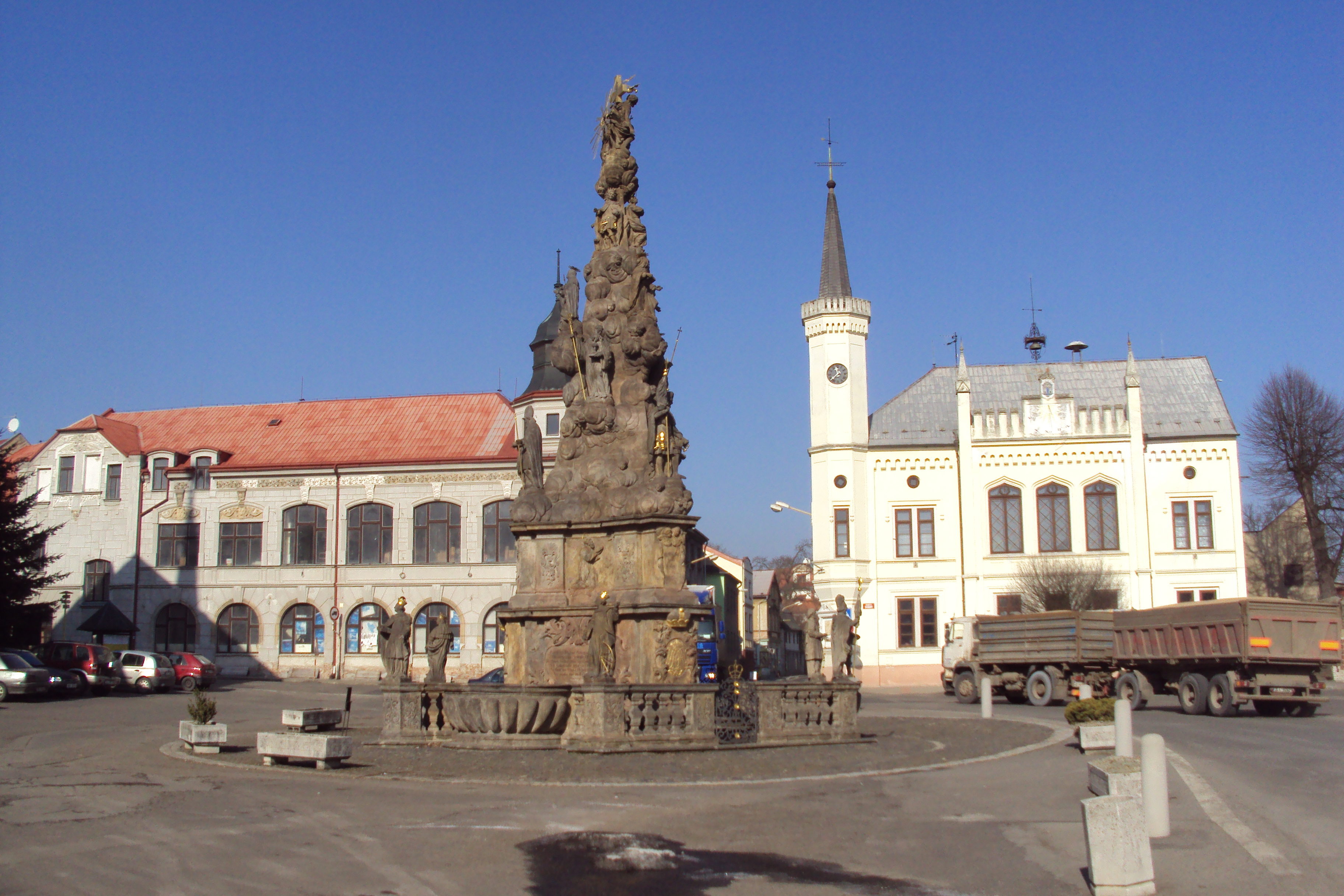 Morový sloup Nejsvětější Trojice (1708), nám.Svobody Zákupy